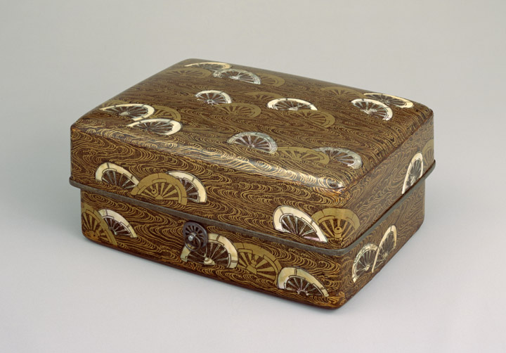 平安時代の工芸を代表する蒔絵の名品。金・青金の研出蒔絵と螺鈿を用いて流水に半ば浸された無数の車輪を描き，内面には金・銀の研出蒔絵で草花や飛鳥を散らしている。